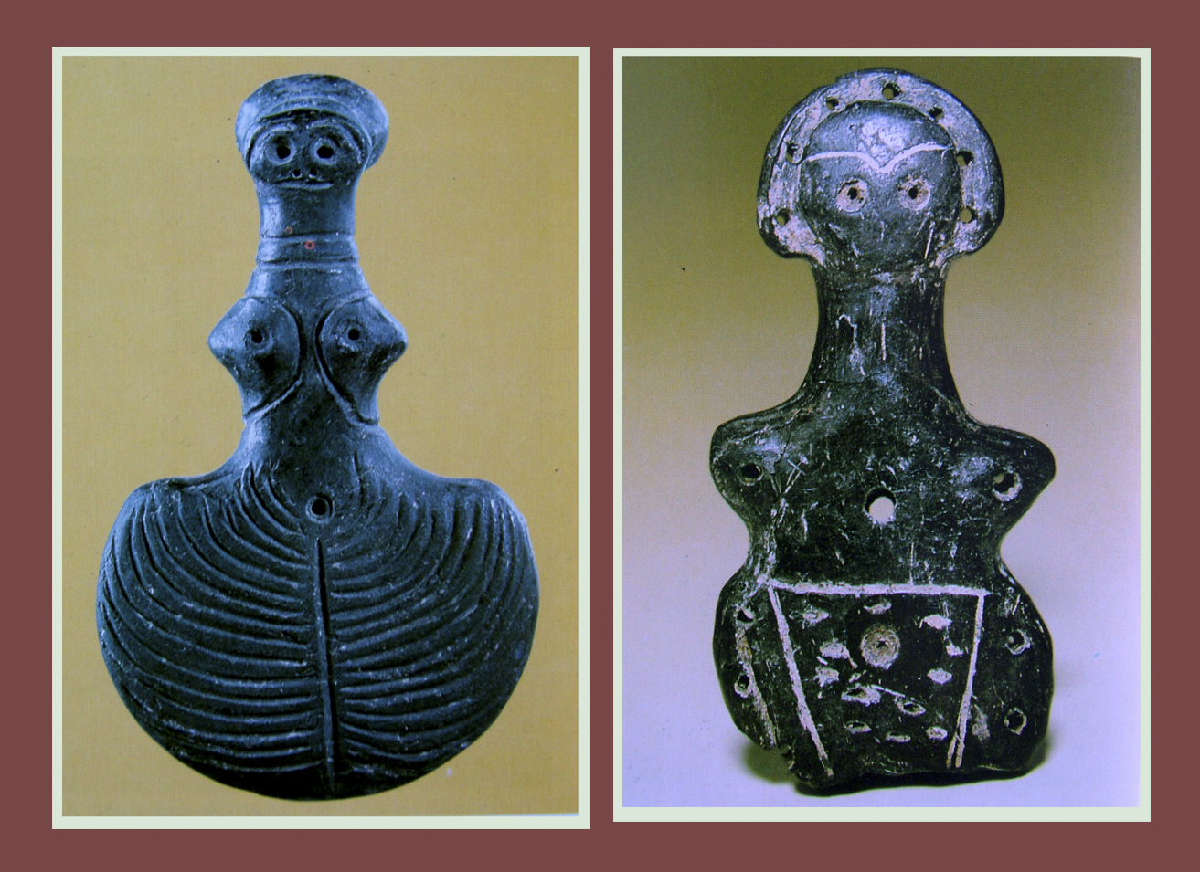 Kerámia istennőidolok (Anatóliai Civilizációk Múzeuma, Ankara)